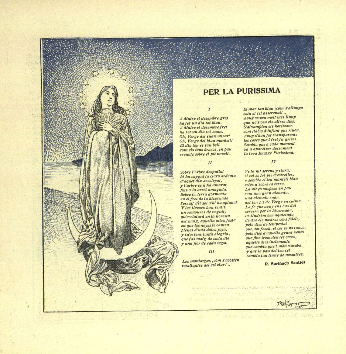 Garba (revista)